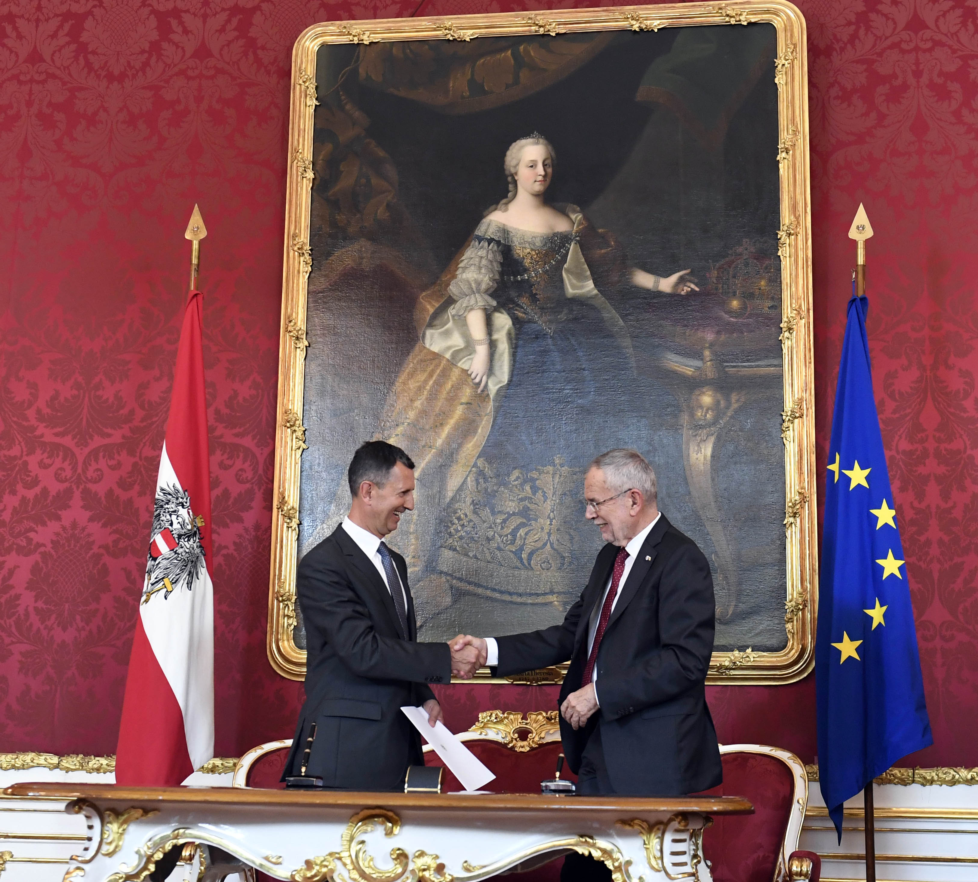 Am 3. Juni 2019 wurde Mag. Alexander Schallenberg als Bundesminister für Europa, Integration und Äußeres angelobt. Foto: Mahmoud